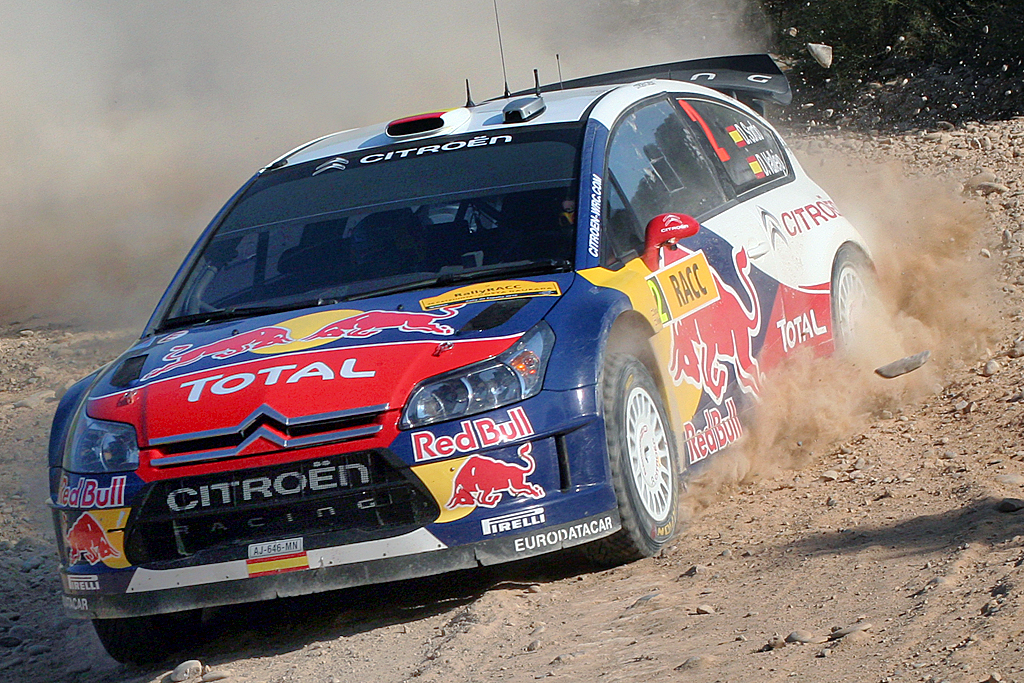 Dani Sordo Diego Vallejo - Rally Cataluña 2010